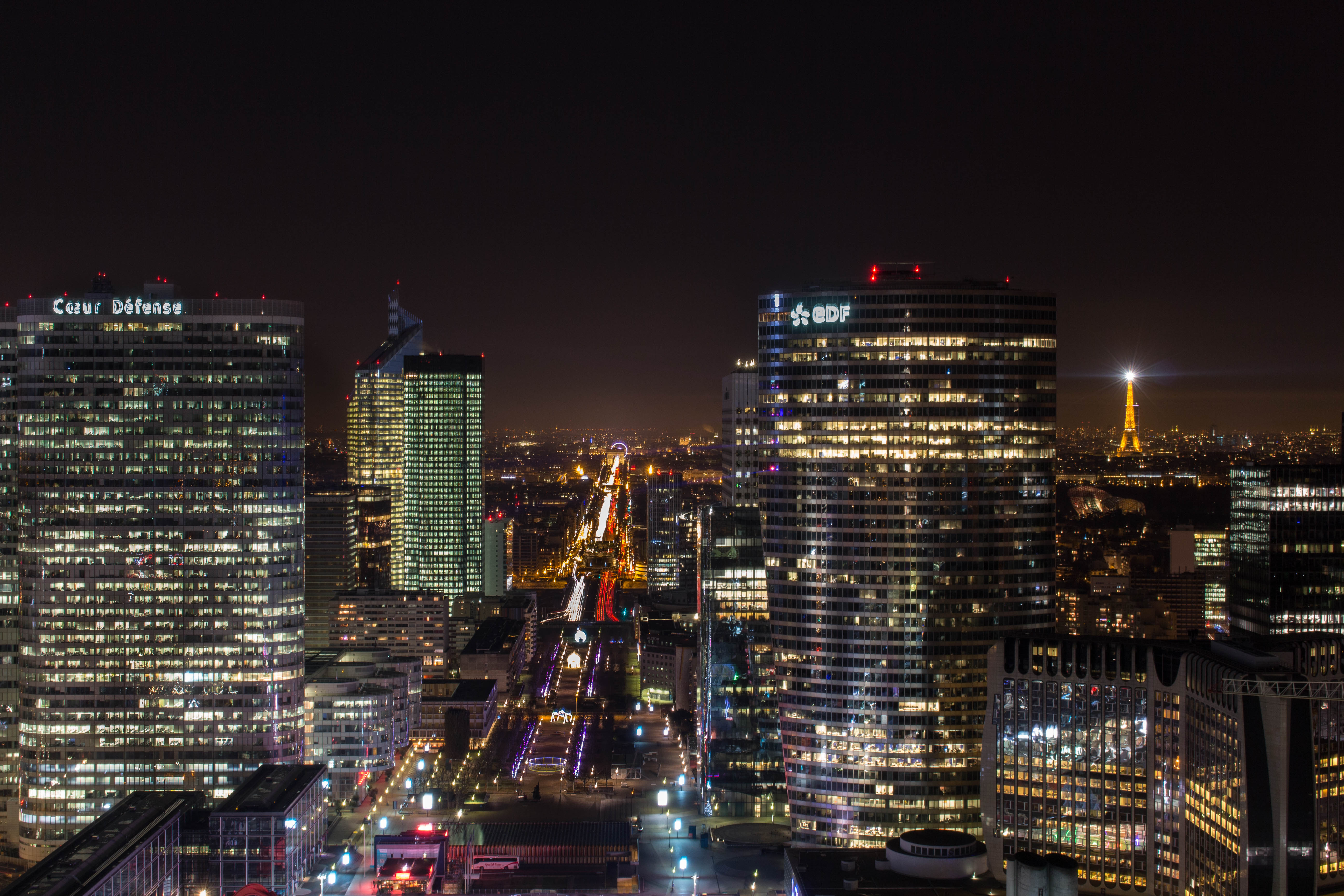 On aperçoit en premier plan la tour EDF et Cœur Défense. En deuxième plan la tour GDF et la tour CB21. En troisième plan on voit la grande roue place concorde et la tour Eiffel. Taking by